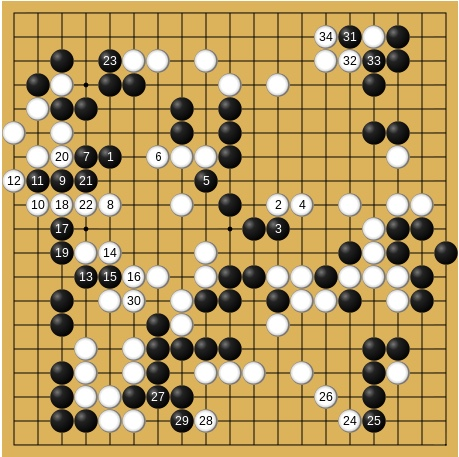 1978年3月22-23日 第2期棋聖戦挑戦手合七番勝負第5局 藤沢秀行棋聖-加藤劔正本因坊(先番) 51-103手目